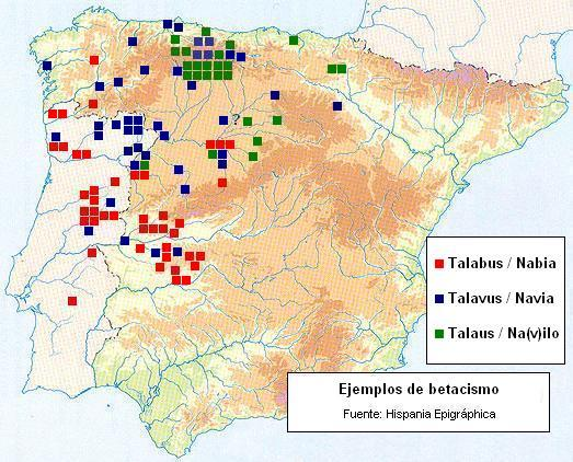 Fenómenos de betacismo en las lenguas prerromanas del occidente peninsular